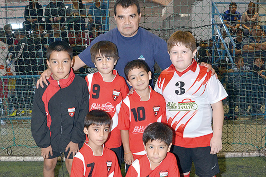 club de futbol la prove